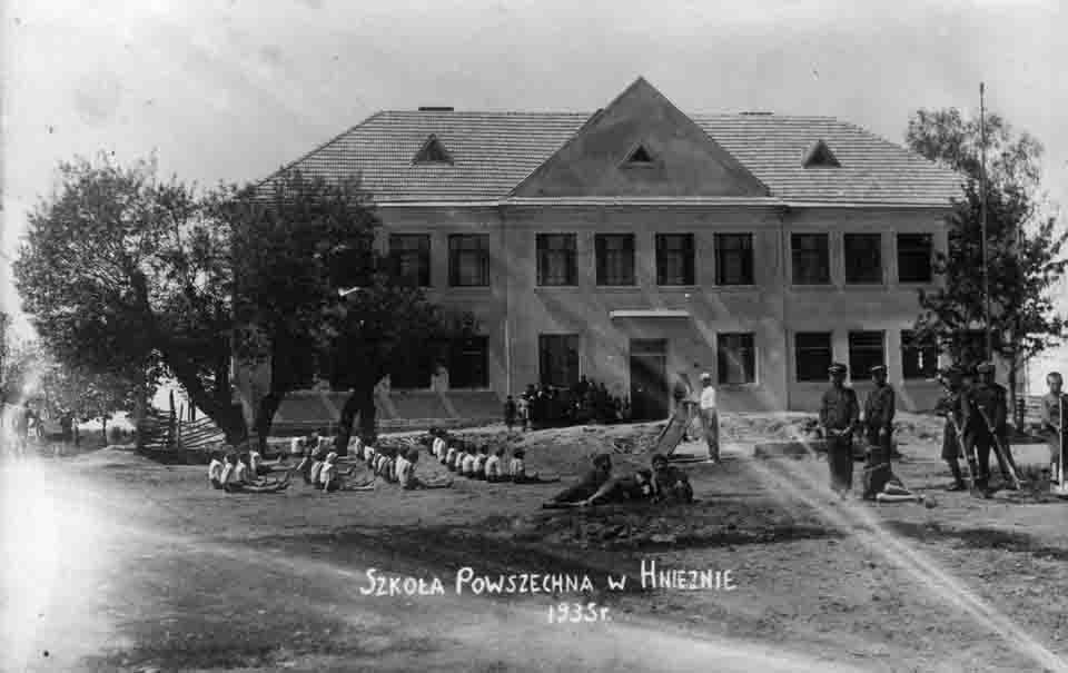 Беларуская (тарашкевіца): Гнезна (Hniezna). Школа